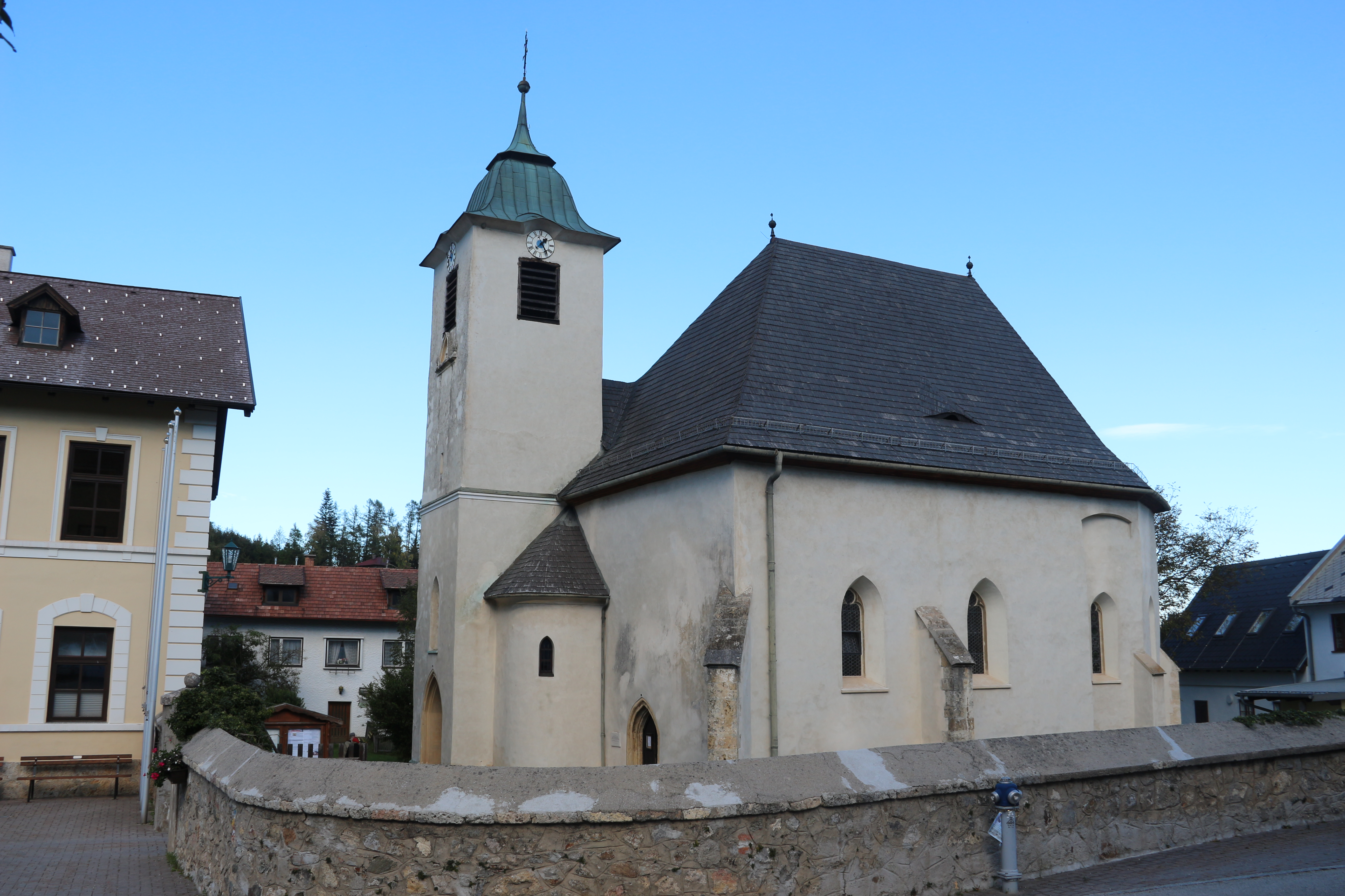 Kath. Pfarrkirche hl. Ägydius mit Kirchhofmauer in Raach am Hochgebirge, Niederösterreich.